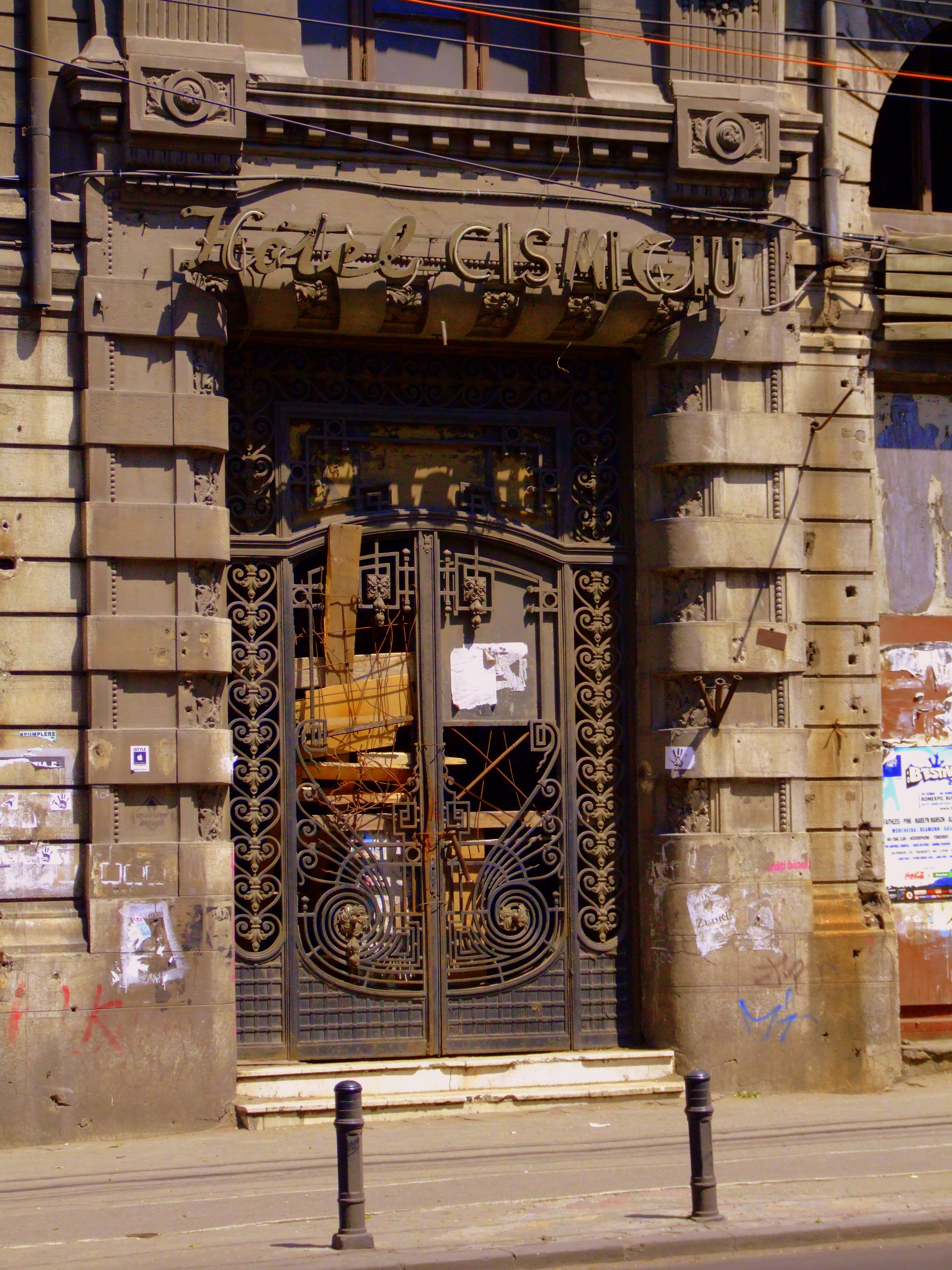 05130018Hotel Palace B-II-m-B-19203